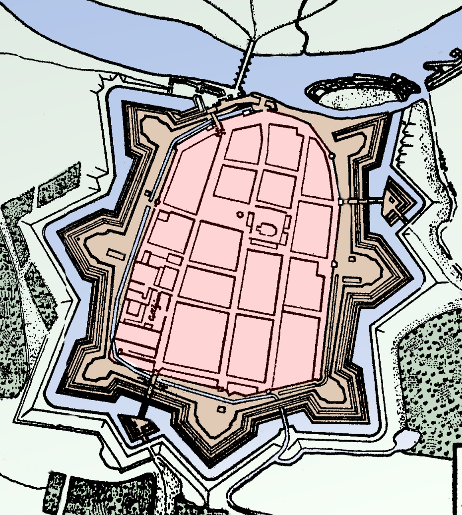 Festung und Stadt Rinteln, Farben nachkoloriert